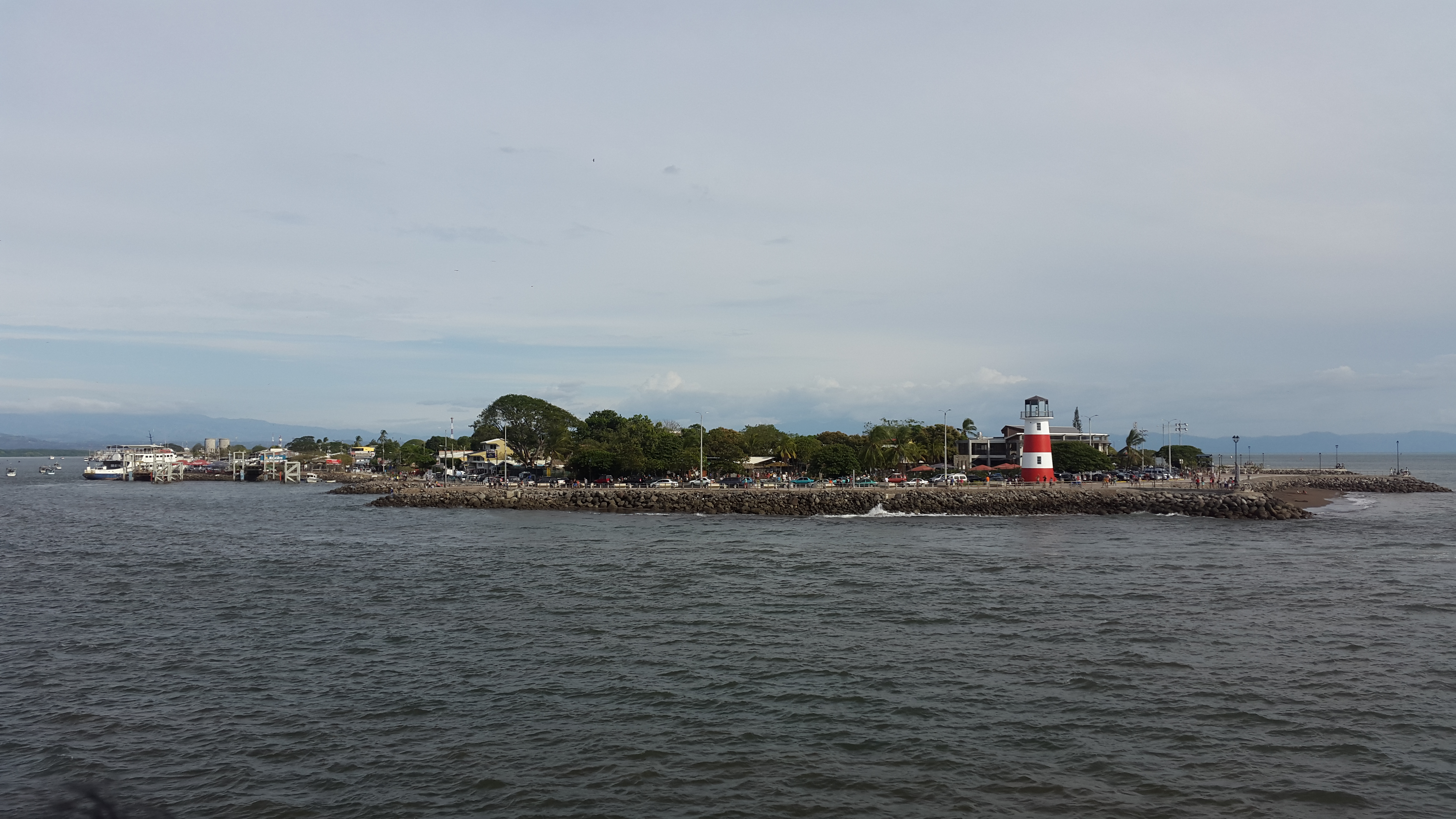 Vista de la ciudad de Puntarenas desde el mar. Se observa el Faro La Punta.